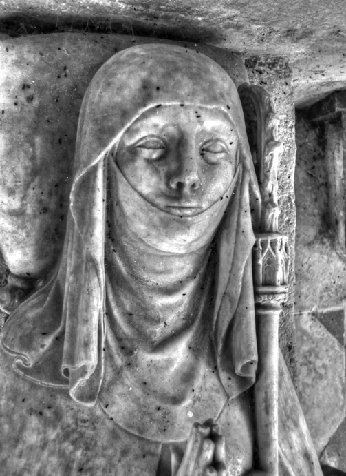 Johana Flanderská